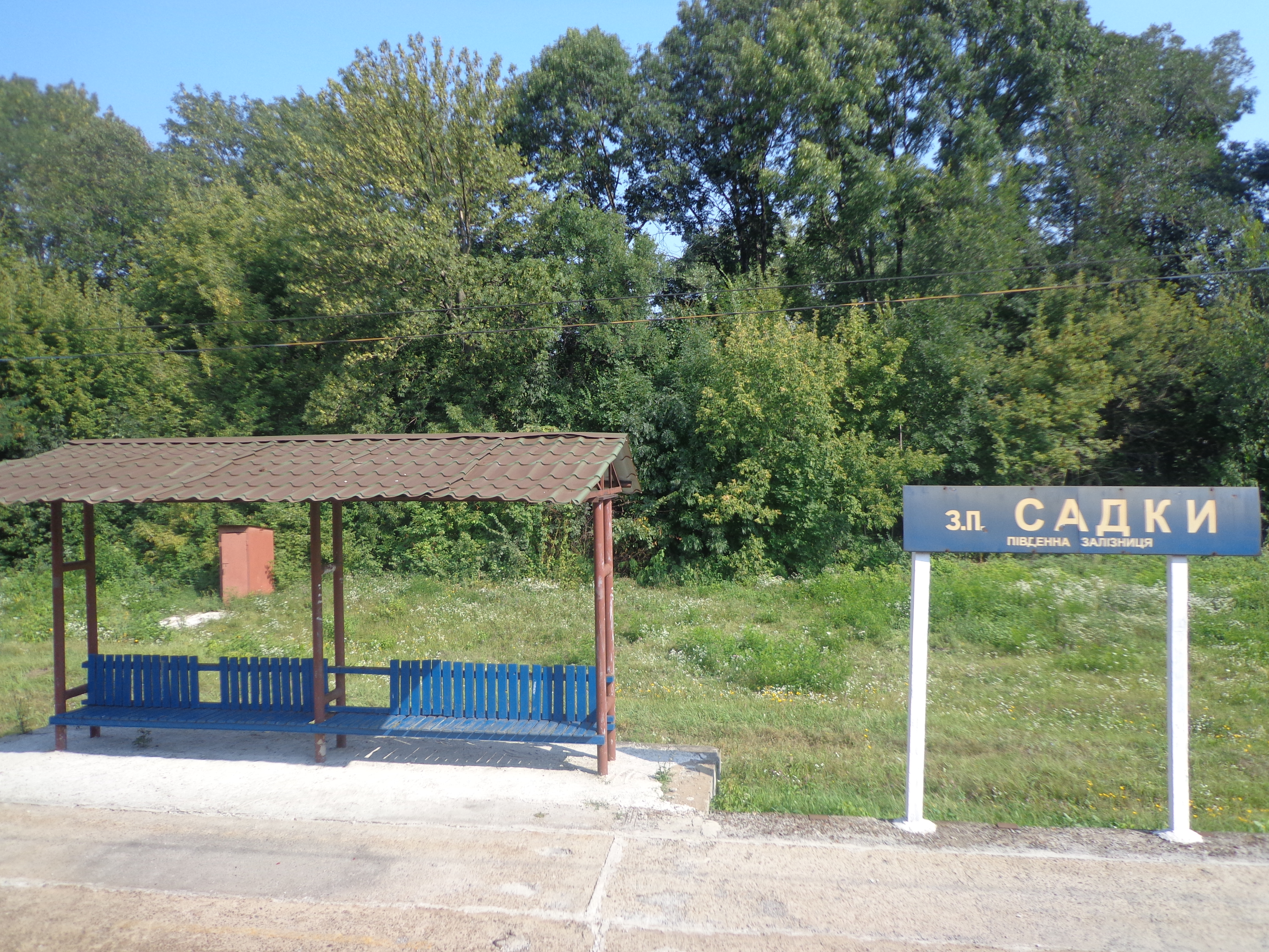 Остановочный пункт Садки, Харьковская область, ветка Харьков-Полтава